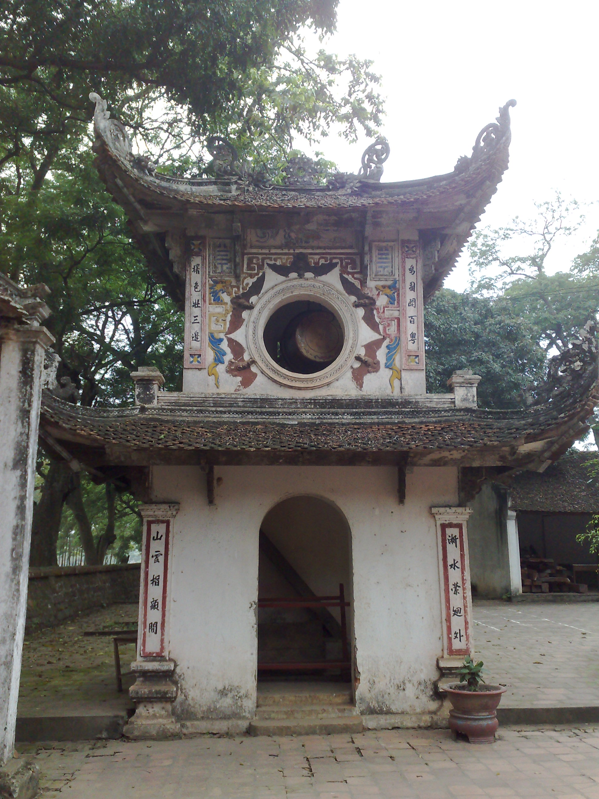 Gác trống đền Và (thị xã Sơn Tây, Hà Tây) do tôi tự chụp và tải lên để minh hoạ cho bài viết Đền Và.